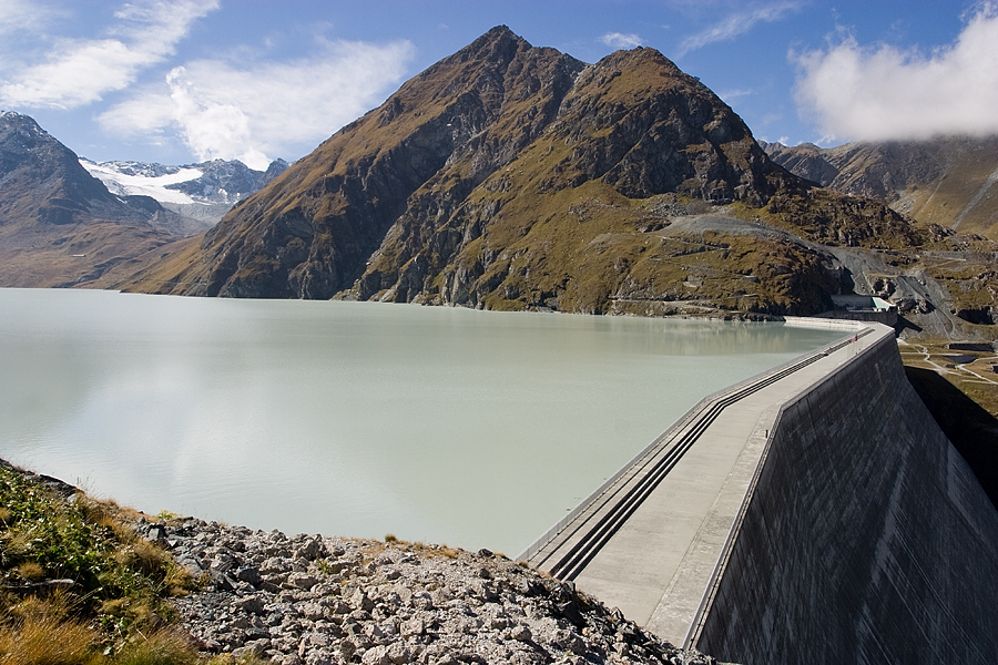 Lac des Dix mit Staumauer